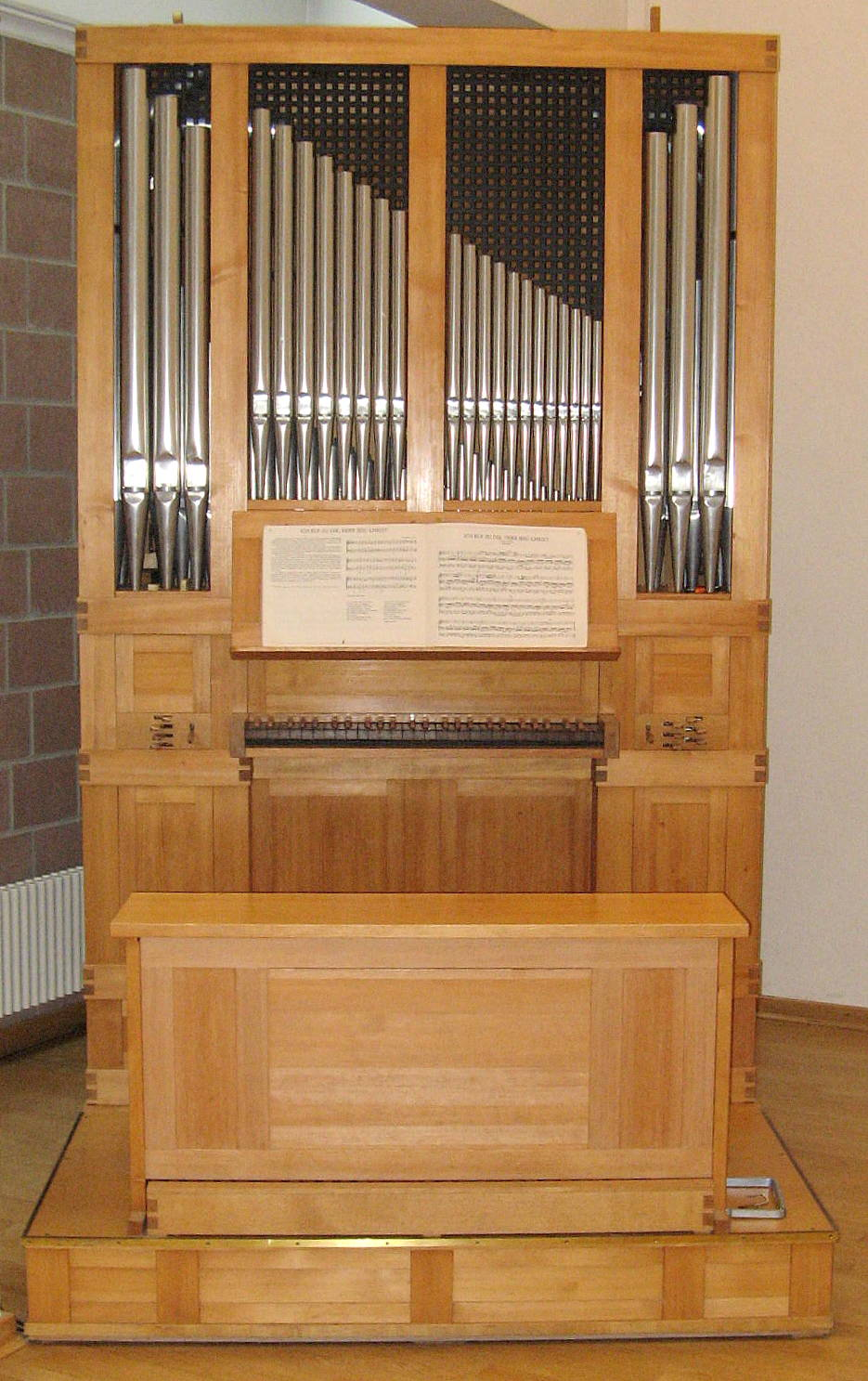 Orgel der Erlöserkirche, Wiesbaden-Sauerland